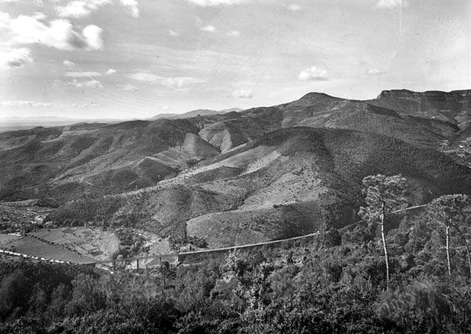 Vista de la vall del Figaró. Frederic Bordas i Altarriba (ca. 1890)